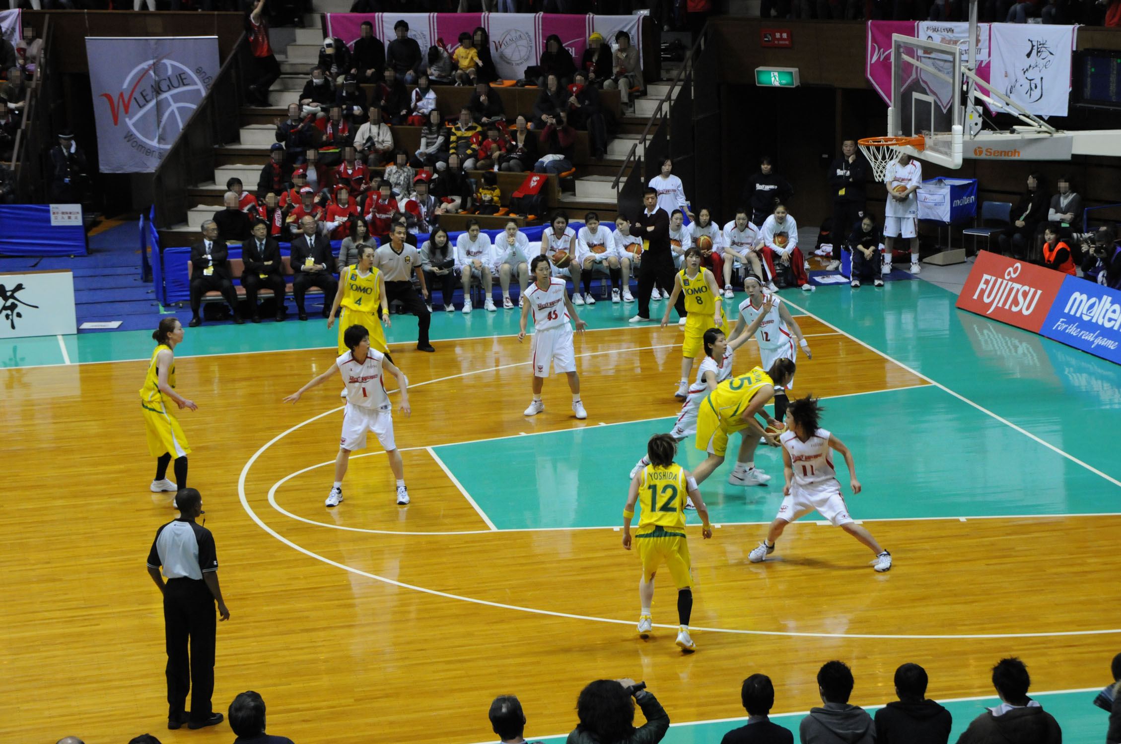 WJBL 08-09プレーオフセミファイナル、富士通対JOMO。代々木第二体育館で。